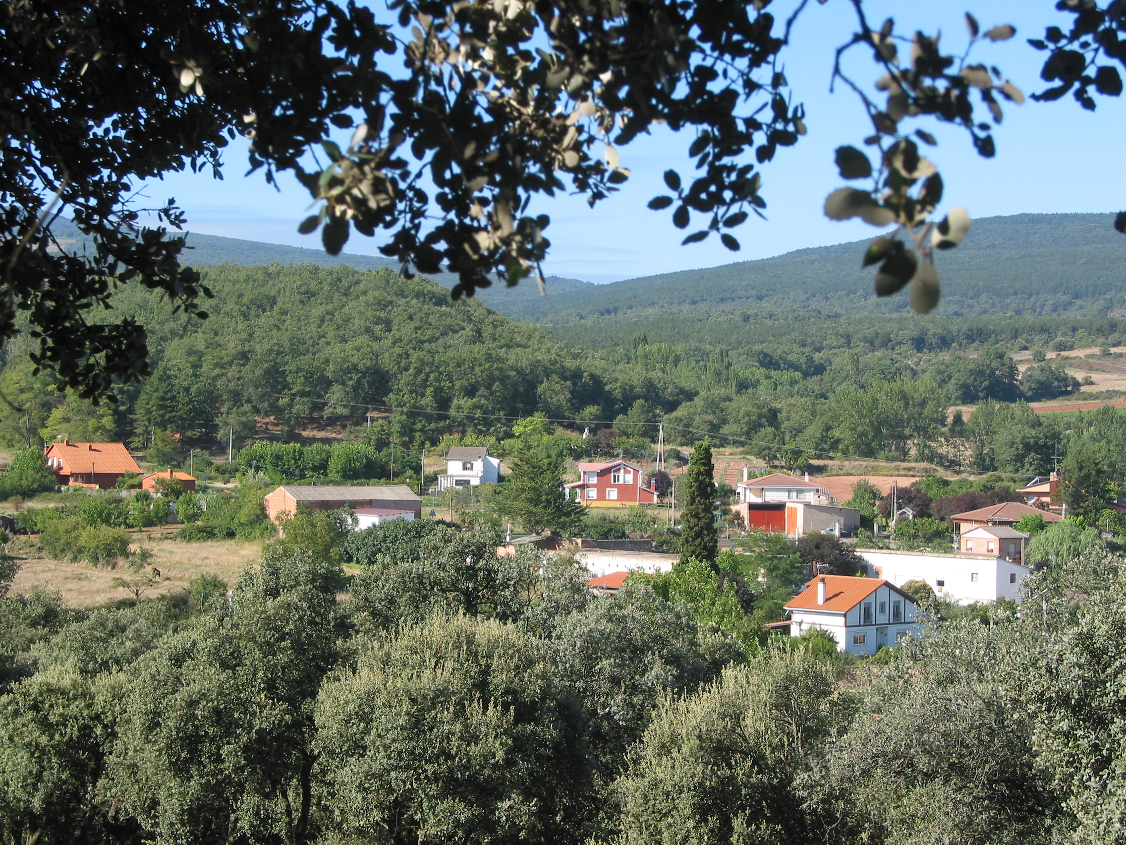 Vista de Hornos de Moncalvillo (La Rioja)